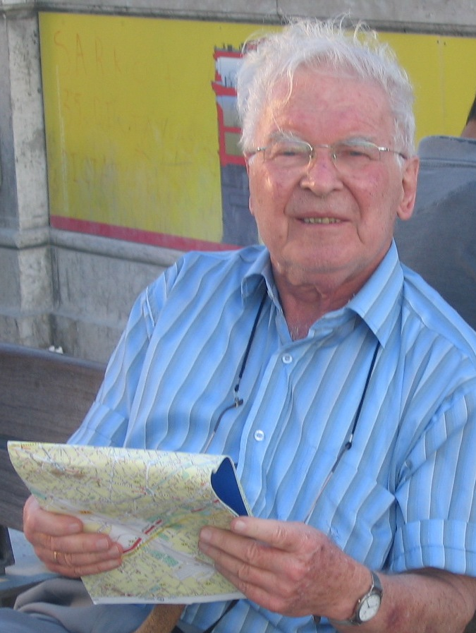 פנחס נוי בכנס בלוון, בלגיה, 2008